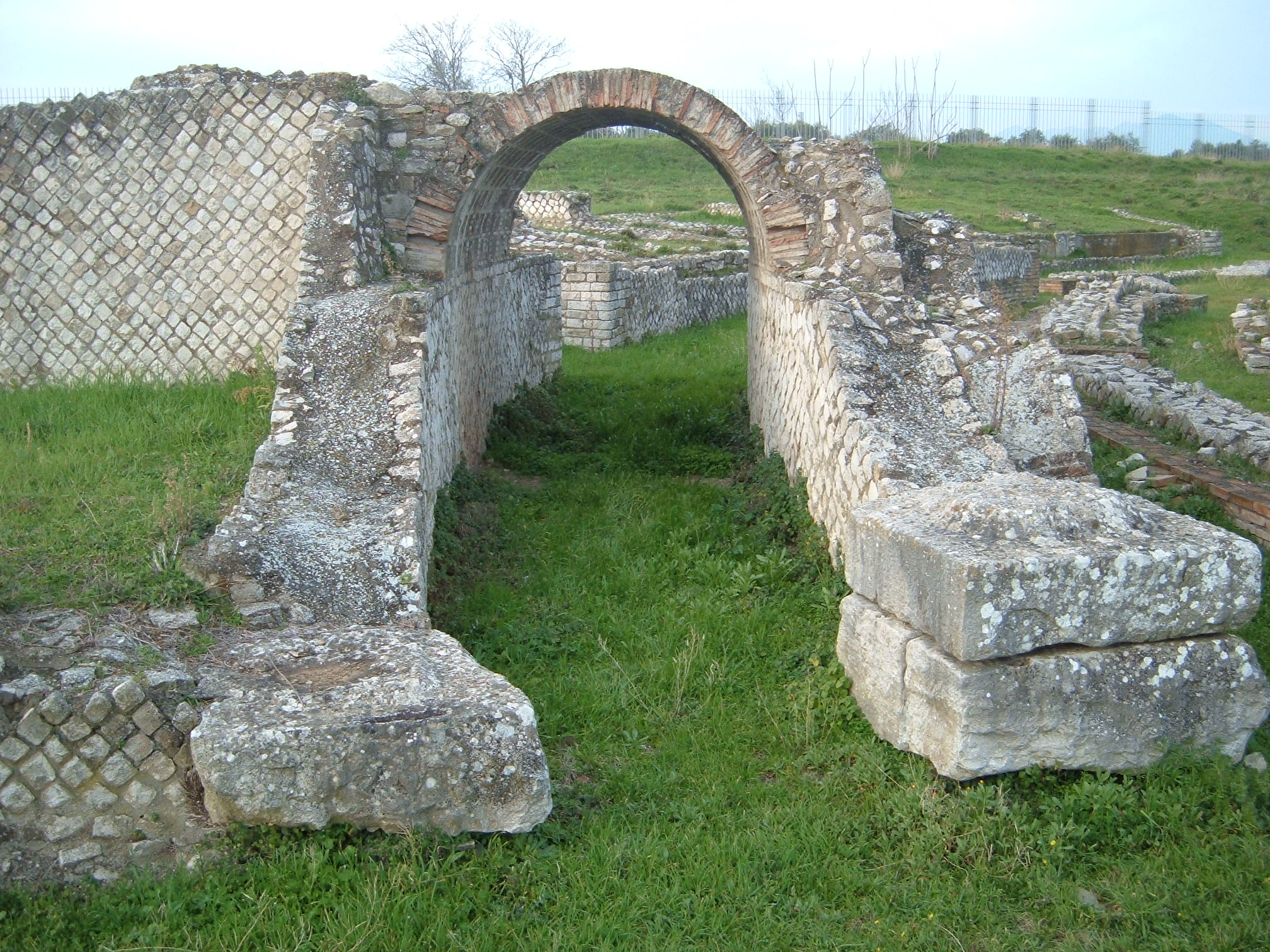 Anfiteatro di epoca romana (Venosa) -Veduta laterale